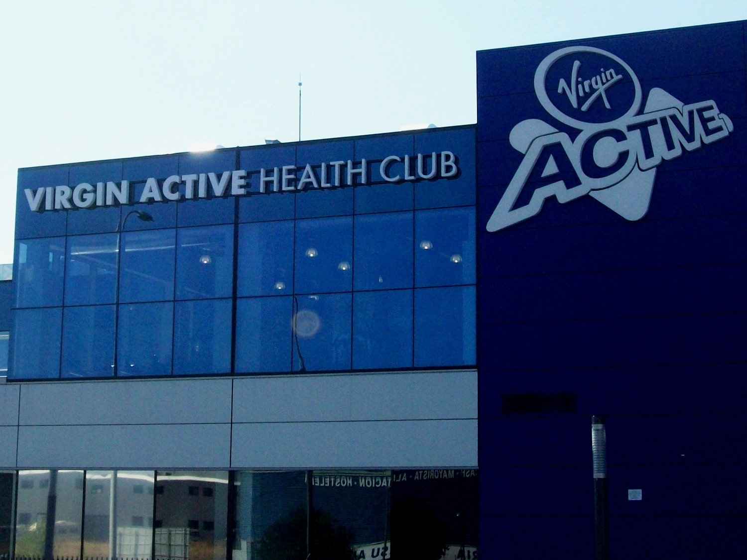 Fachada de un club Virgin Active, en Madrid (España).